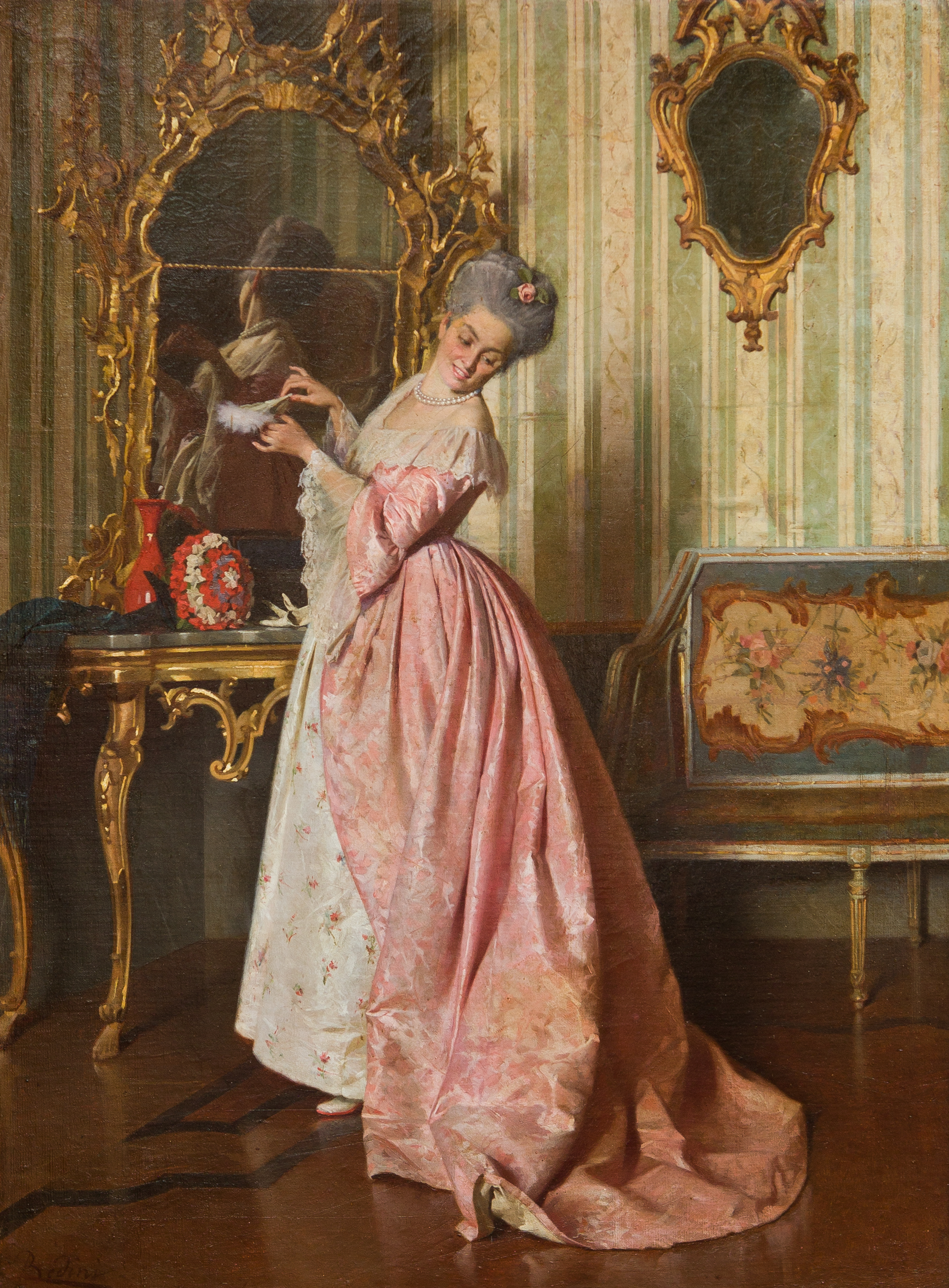 Olio su tela, 50x37cm, coll. privata